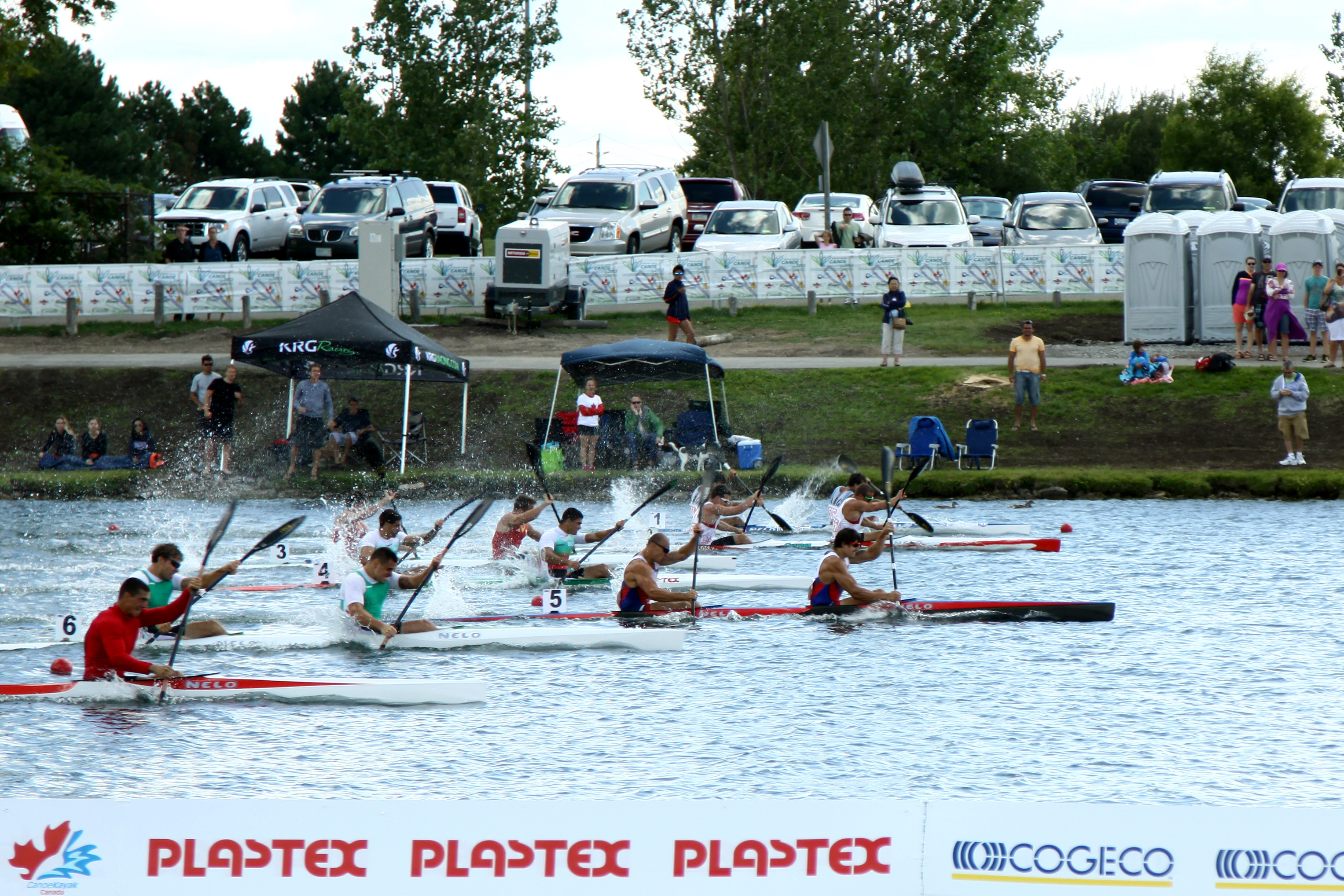 Чемпионат Мира среди молодежи по гребле на байдарках и каноэ, Канада 2013г